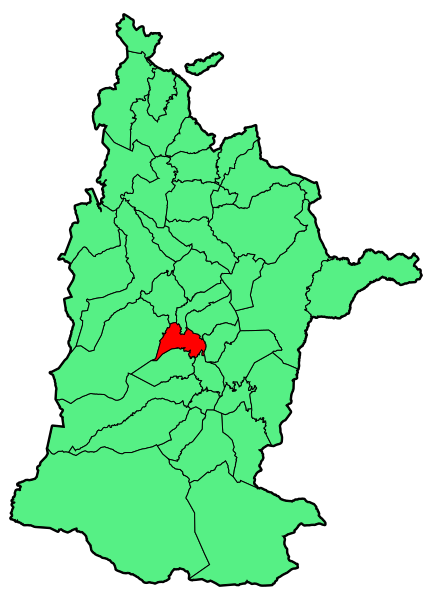 Aipaturiko udalerriaren kokapena Zuberoan